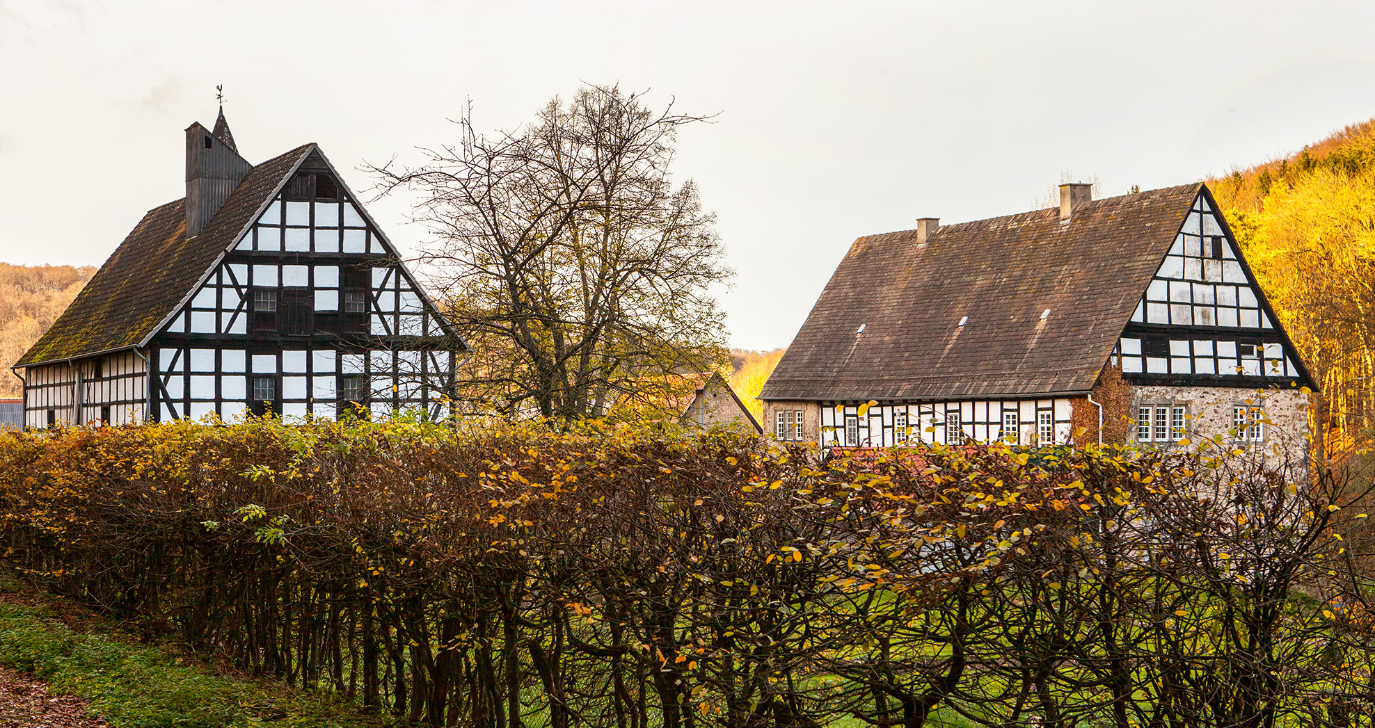 Gut Ullenhausen im Extertal, Kreis Lippe This is the photograph of an architectural monument. It is part of the list of cultural monuments of Extertal, no. 6